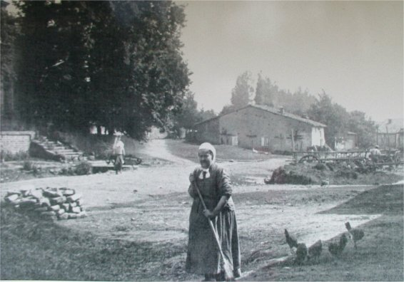 Bezonvaux (FR-55) la grand rue avant 1914 Repro de carte postale antérieure à 1914 photographiée par F5ZV le 17/04/2006 sur un panneau d'information placé sur le site de Bezonvaux